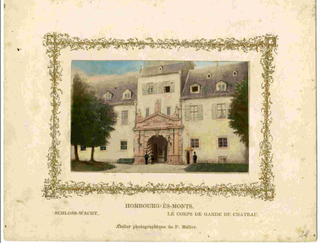 Das untere Portal des Bad Homburger Schlosses. Blick von der Herrengasse auf den Eingang zum unteren Schlosshof mit Wachhäuschen und Soldaten. Handkolorierte Fotografie von Philipp Müller, auf Pappe aufgezogen, mit goldenem floralem Schmuckrahmen.